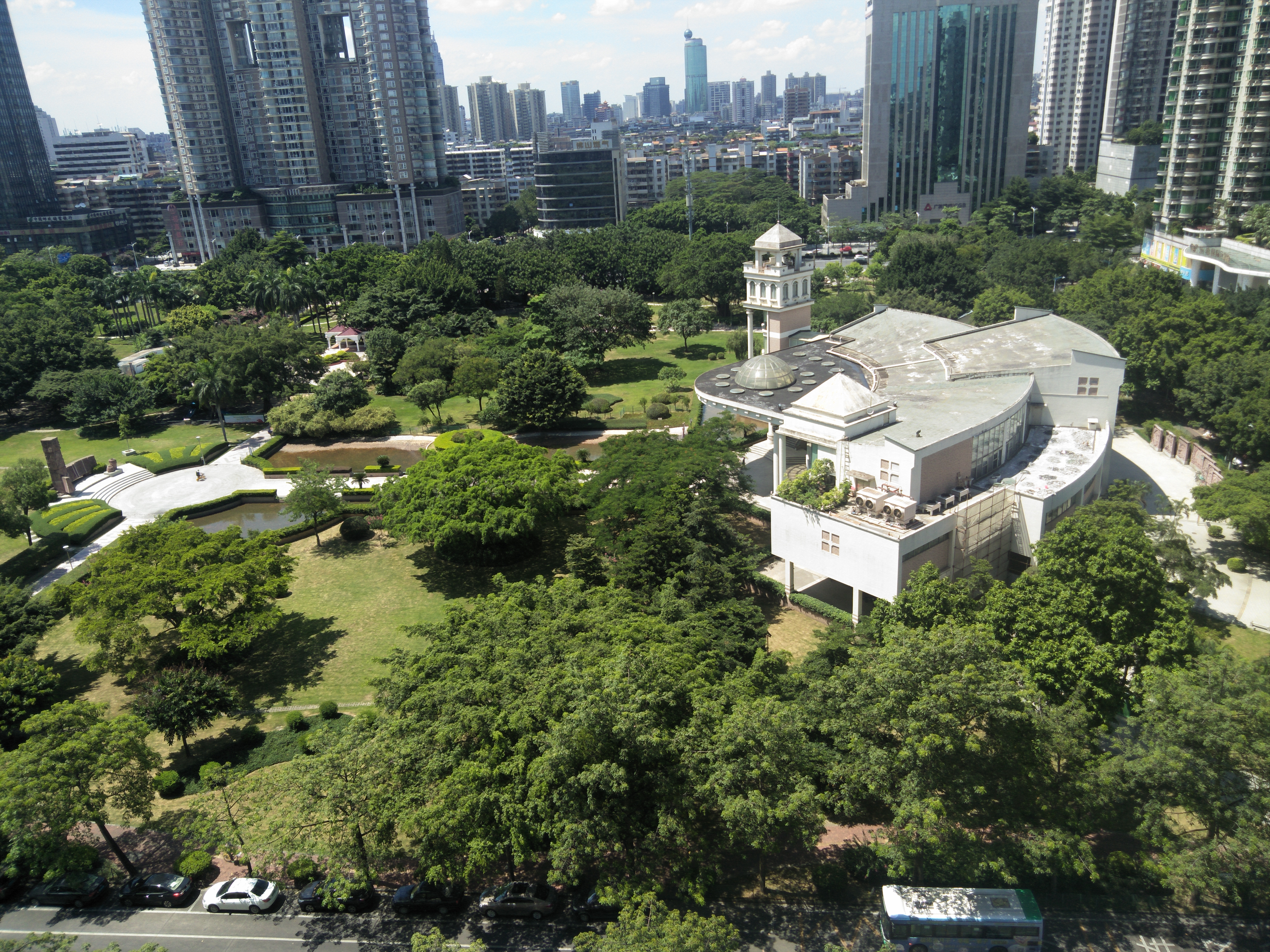 季华公园的俯视图